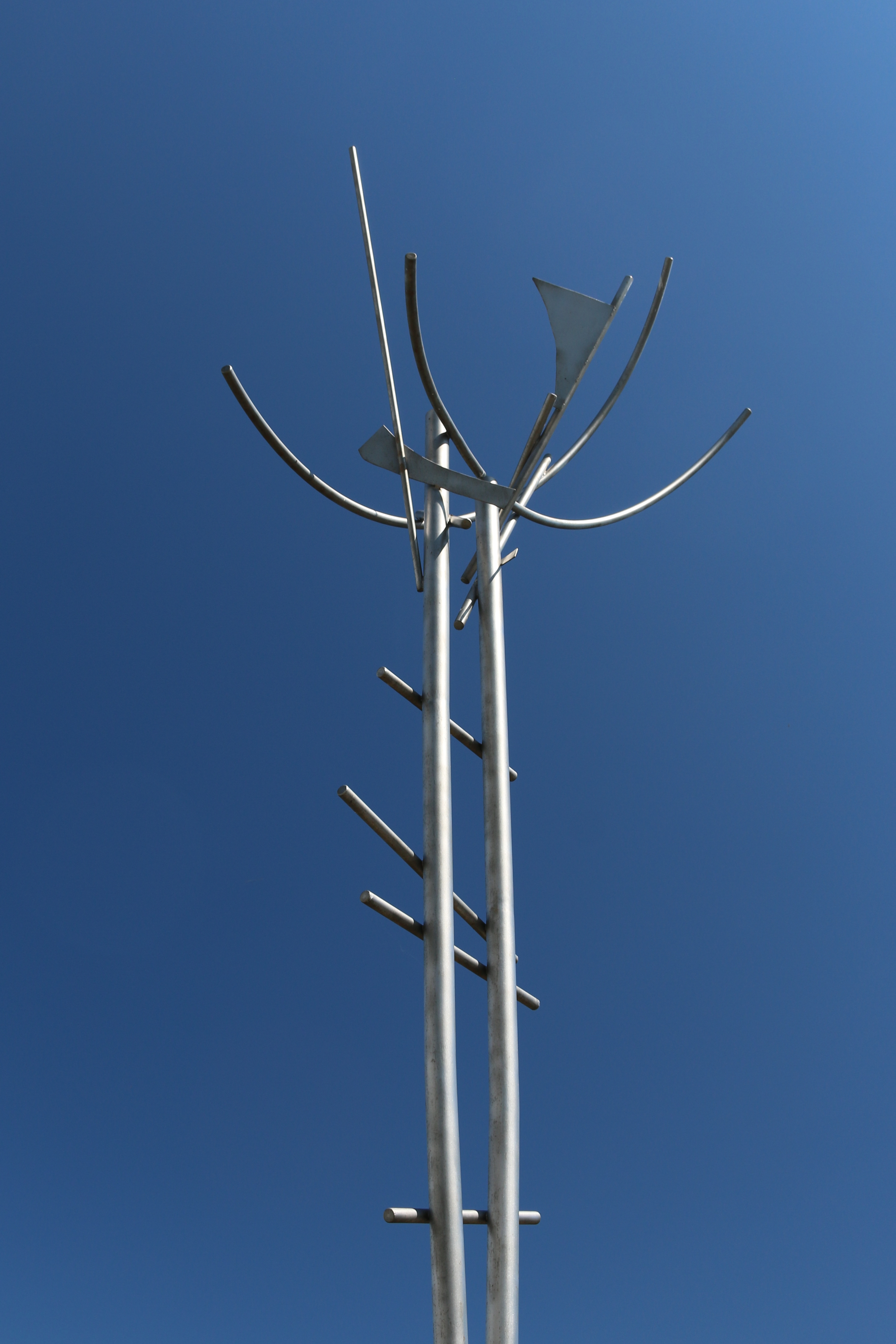 Riggmasten av Gösta Werner, skulptur i Simrishamn